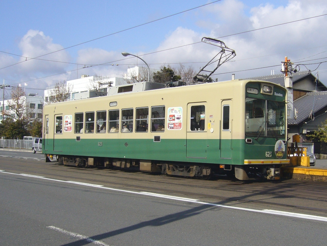 京福電気鉄道モボ621形623号車。台車は種車オリジナルの川車BWE12を使用している。西大路三条駅の四条大宮駅行きホーム（安全地帯）に進入中。後方は島津製作所本社。2009年1月23日に投稿者が撮影。